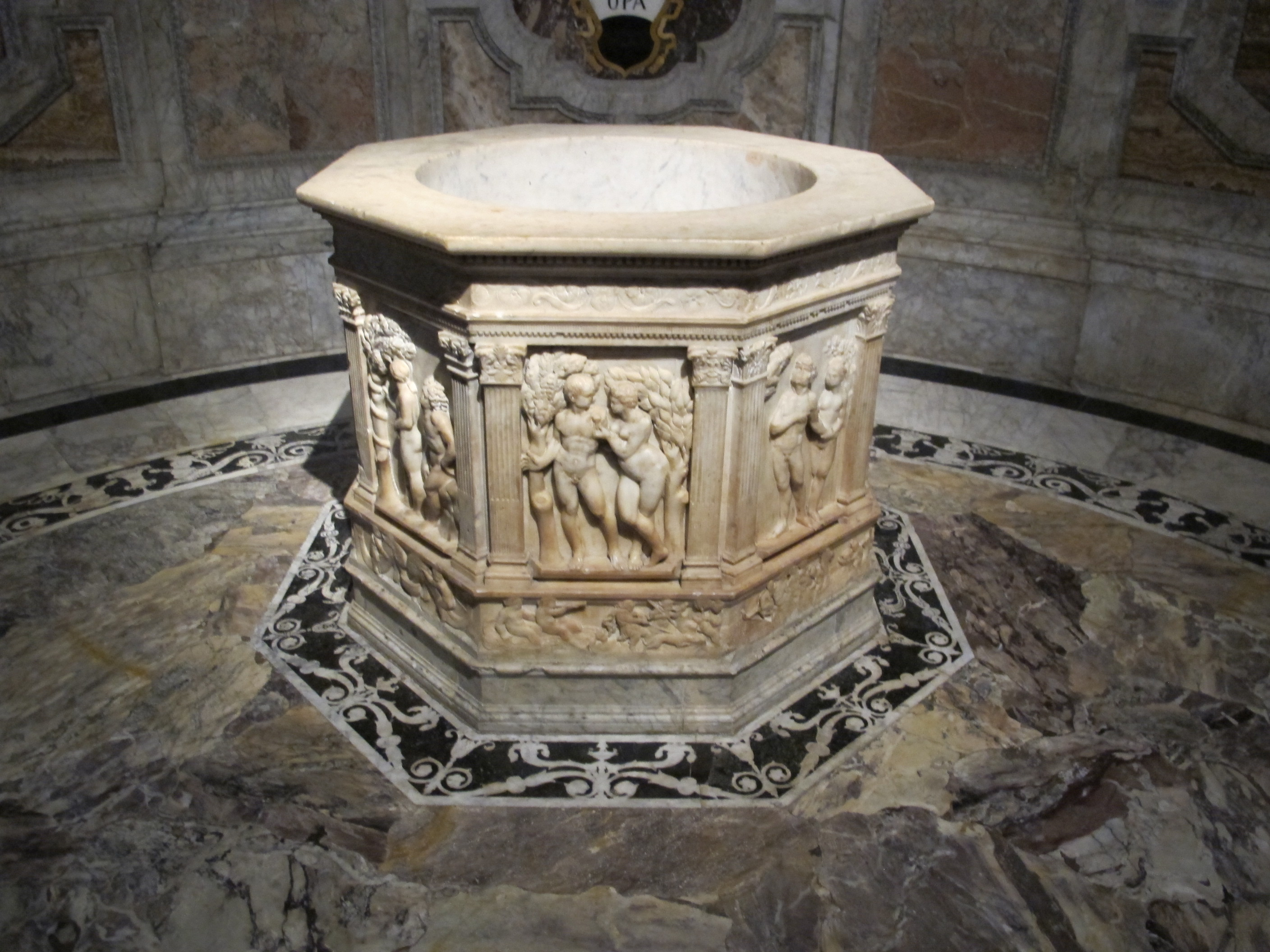 Cappella di s. giovanni, siena, 13 fonte di Antonio Federighi